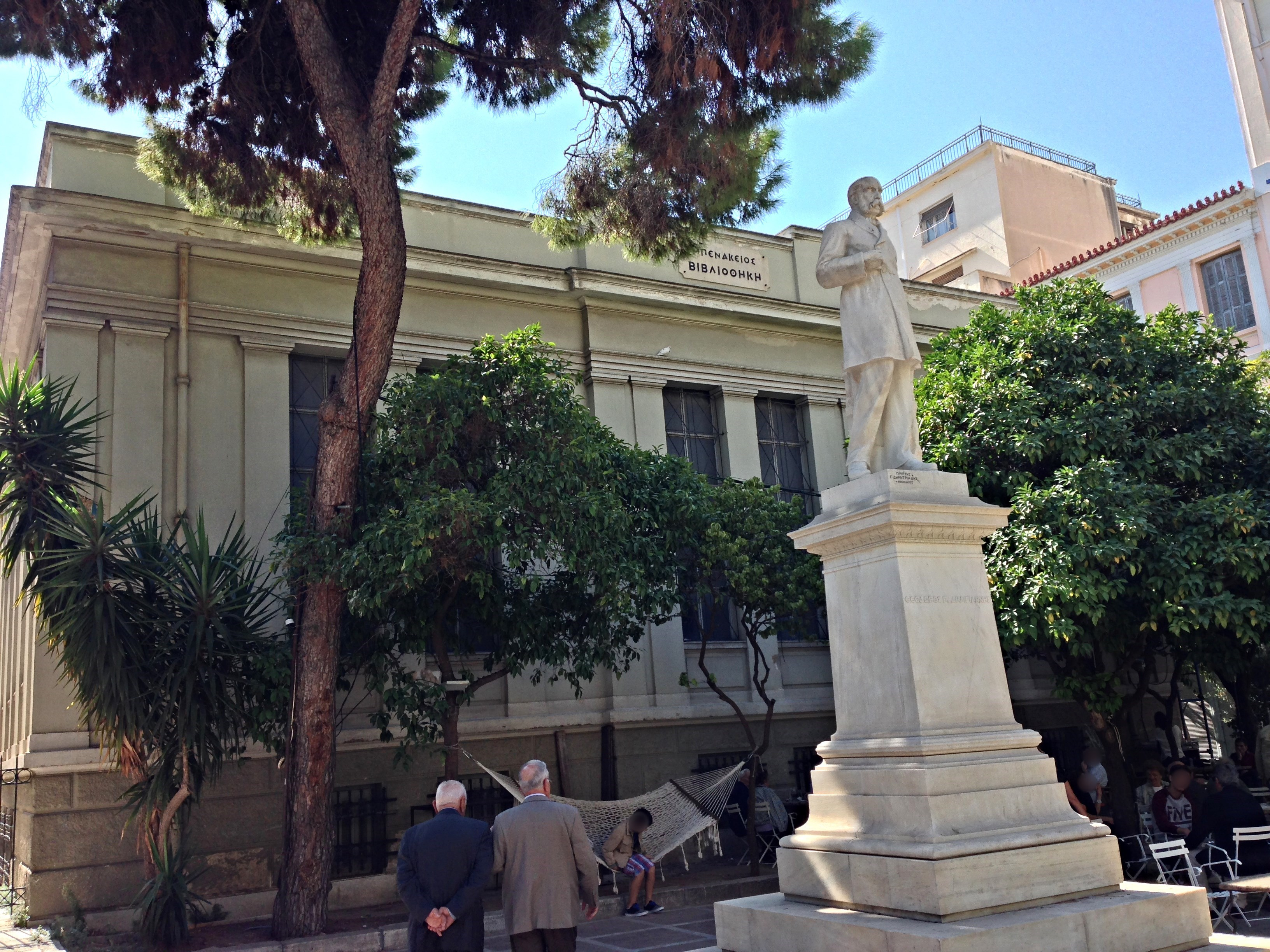 Μπενάκειος Βιβλιοθήκη